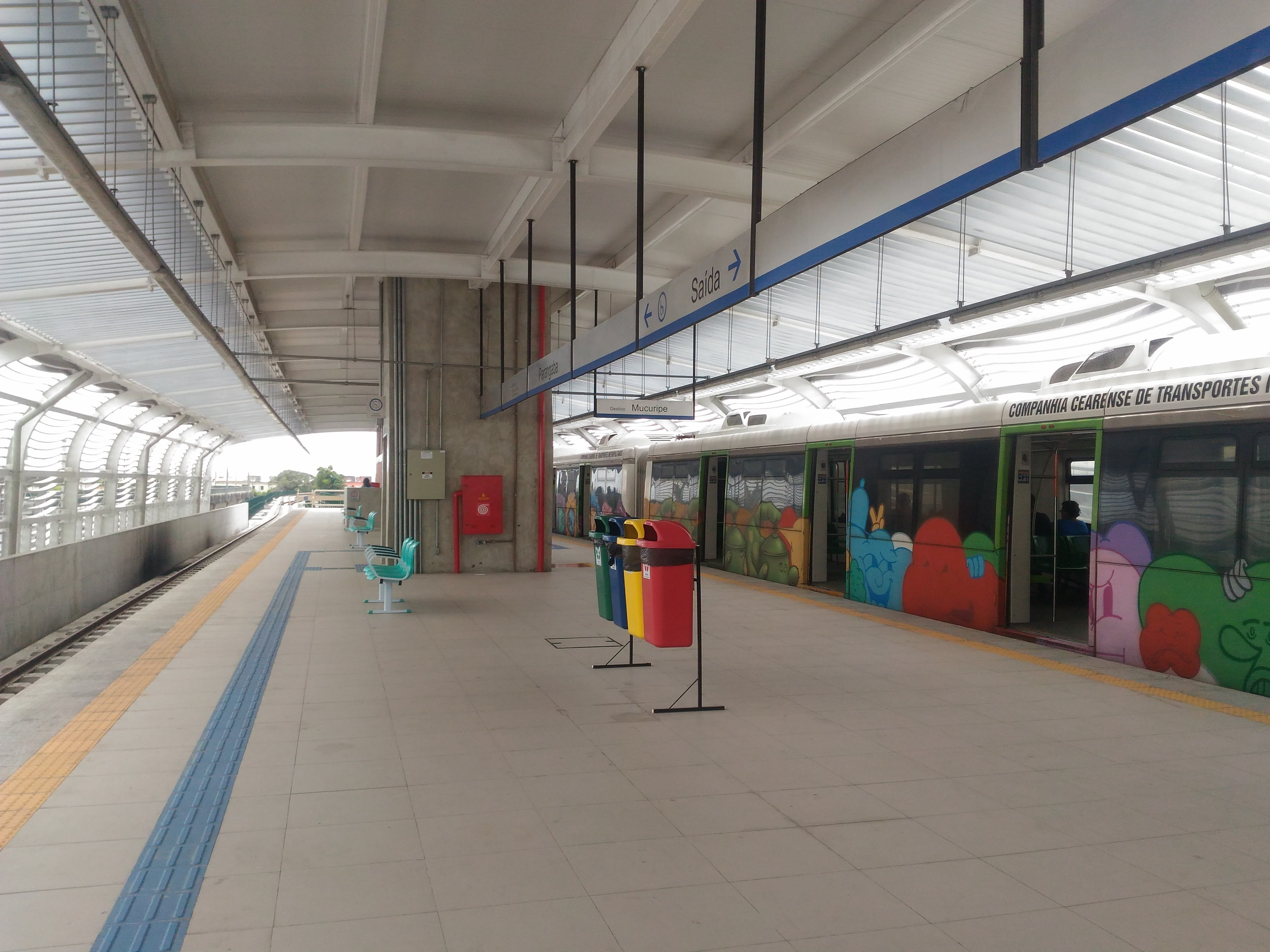 Plataforma destinada ao VLT na estação Parangaba.